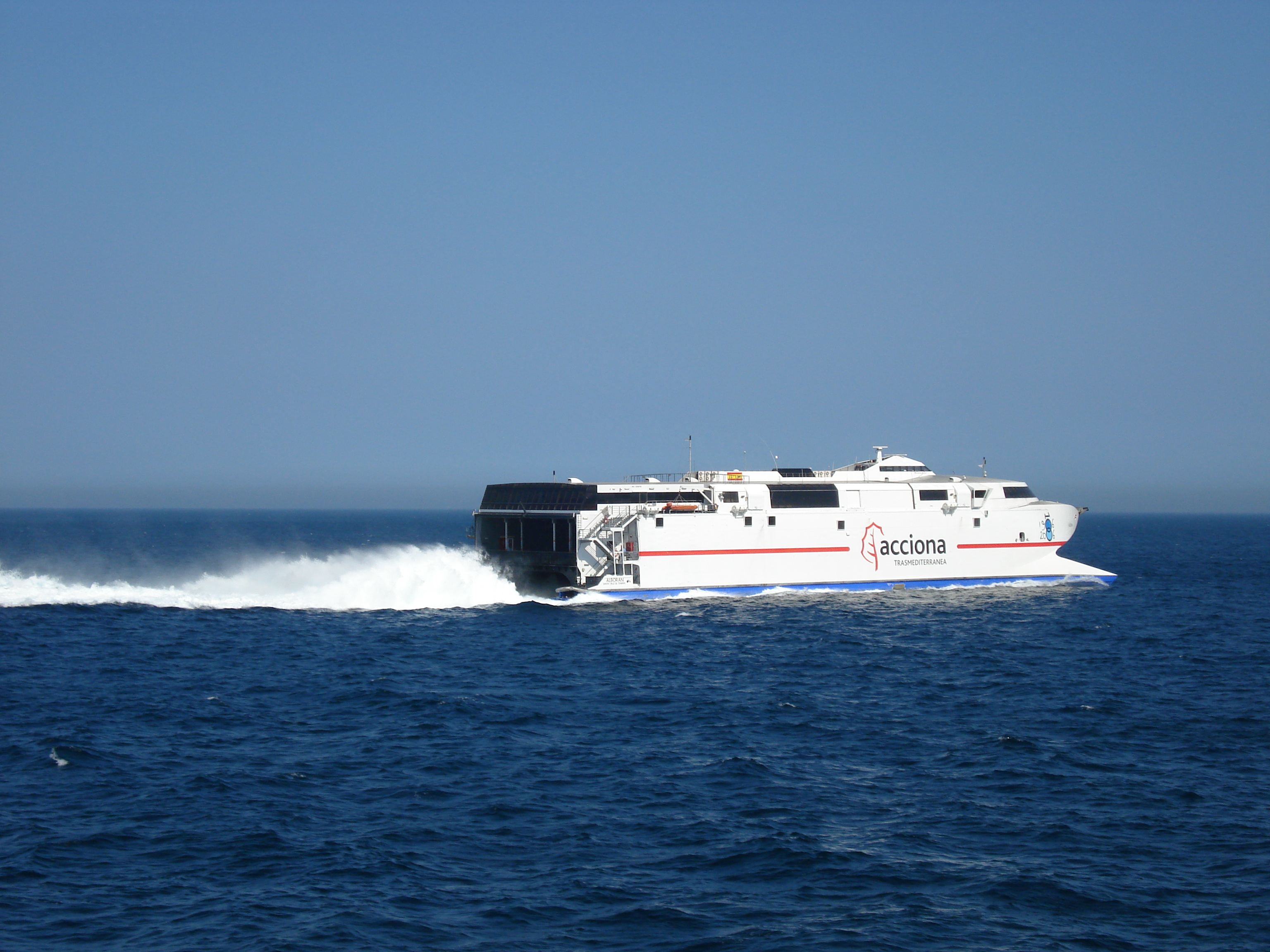 In Gibraltar - MV ALBORAN - Acciona - Trasmediterranea